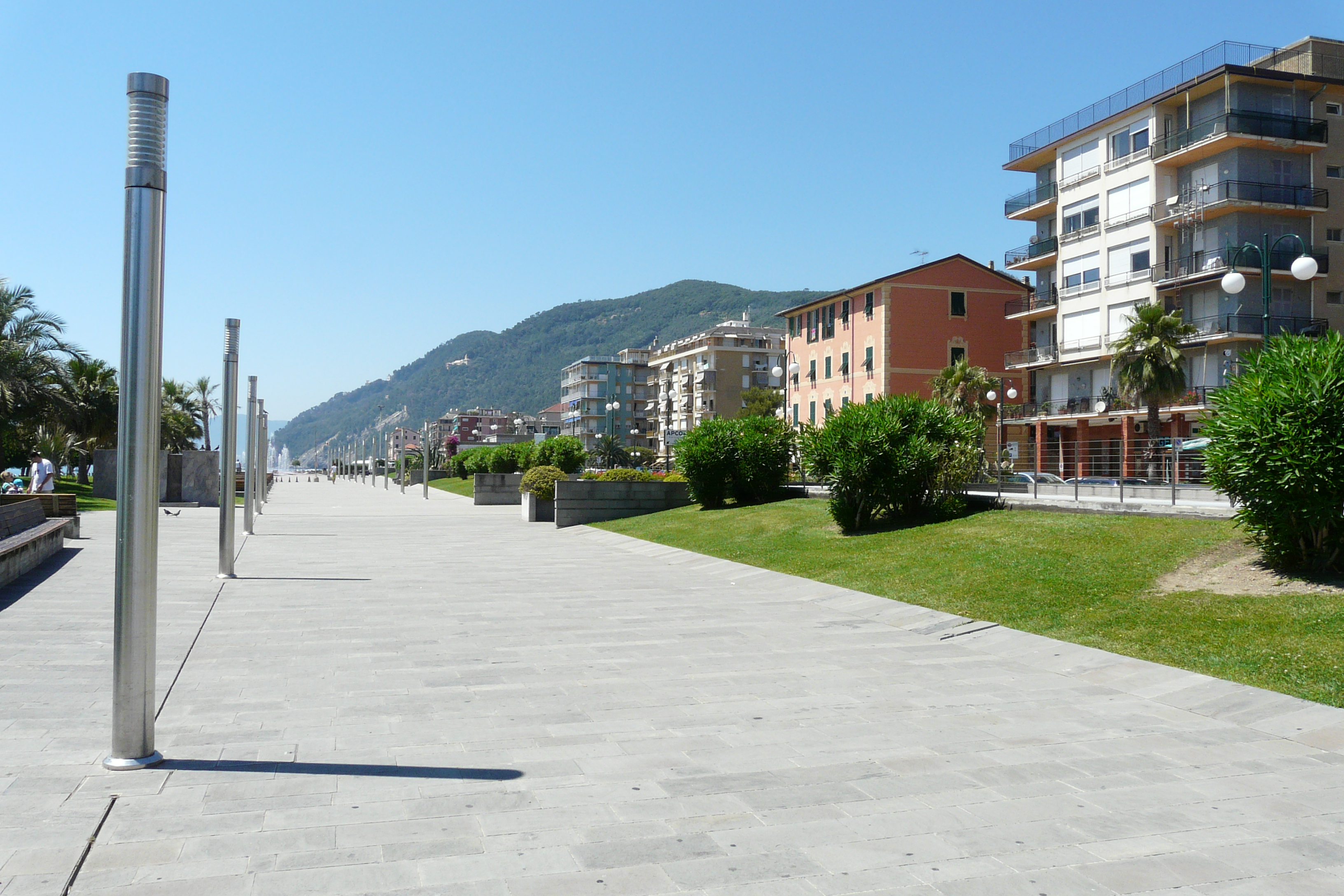 Lungomare, Chiavari, Liguria, Italia